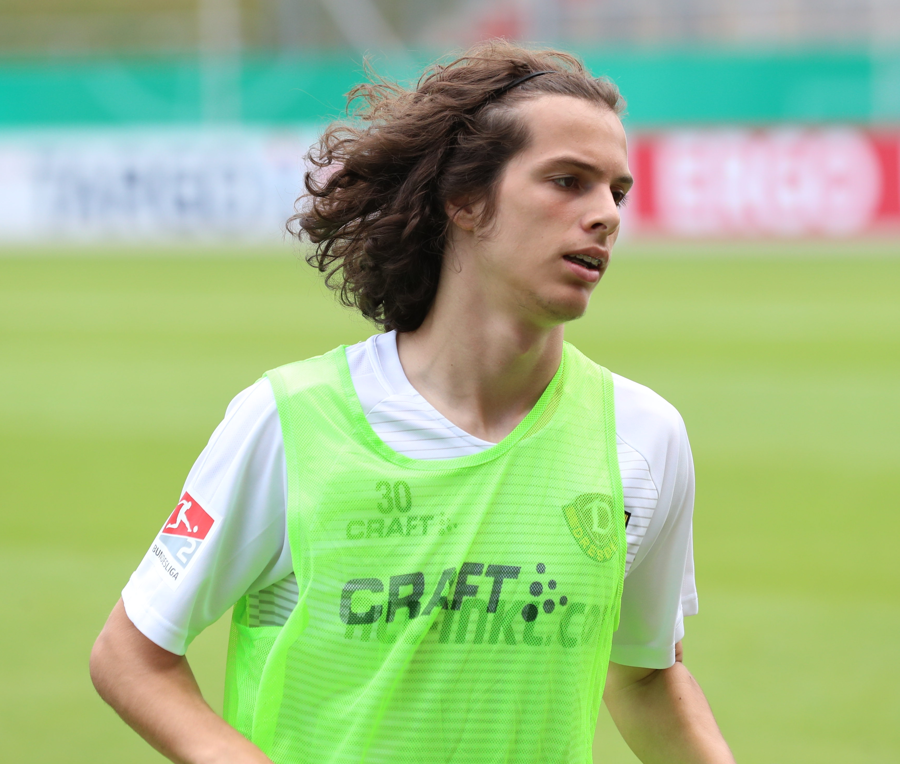 DFB-Pokal 2019/20, 1. Hauptrunde, TuS Dassendorf gegen SG Dynamo Dresden 0:3 (0:1)